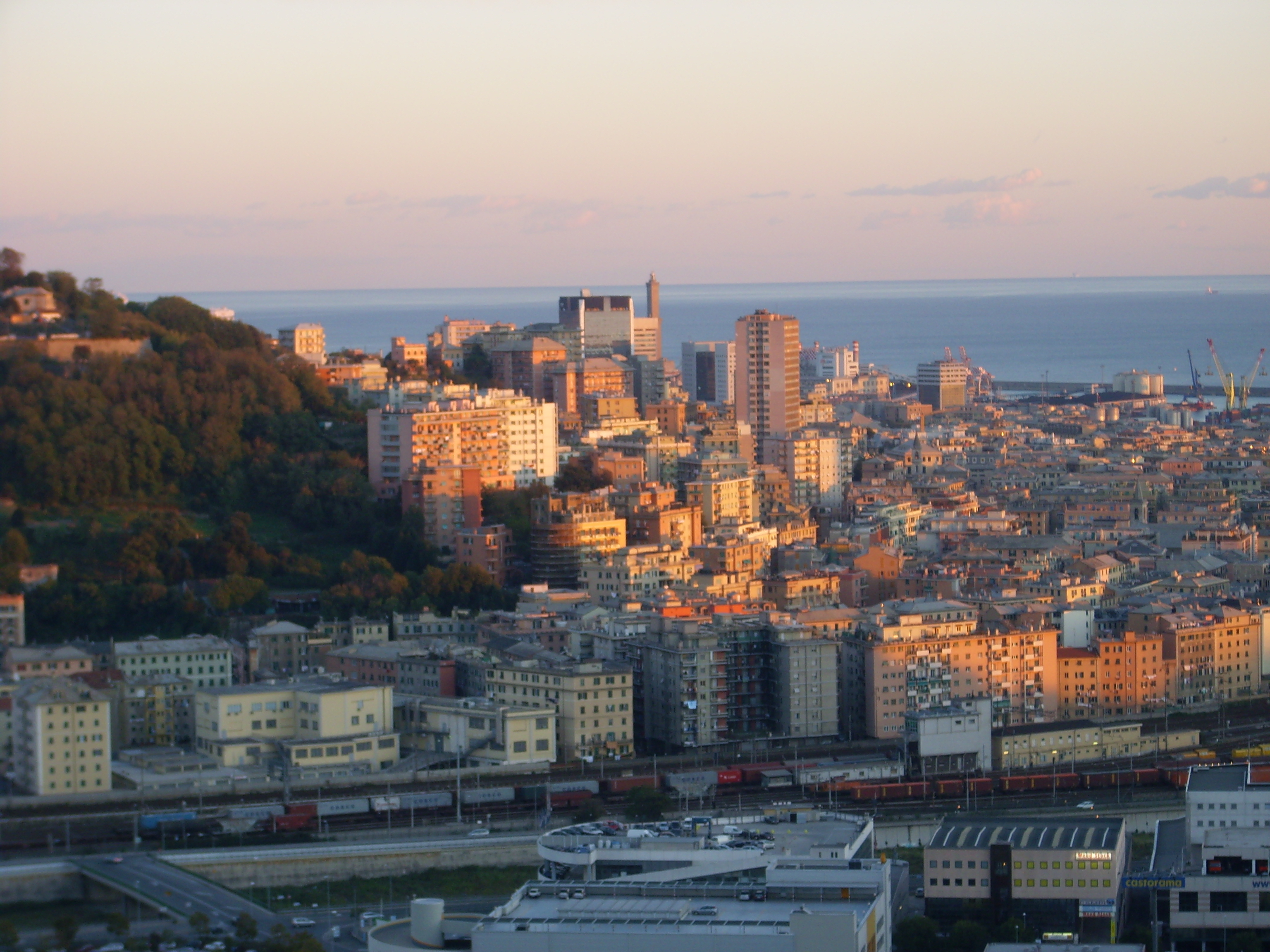 Il quartiere di Sampierdarena visto da Coronata.